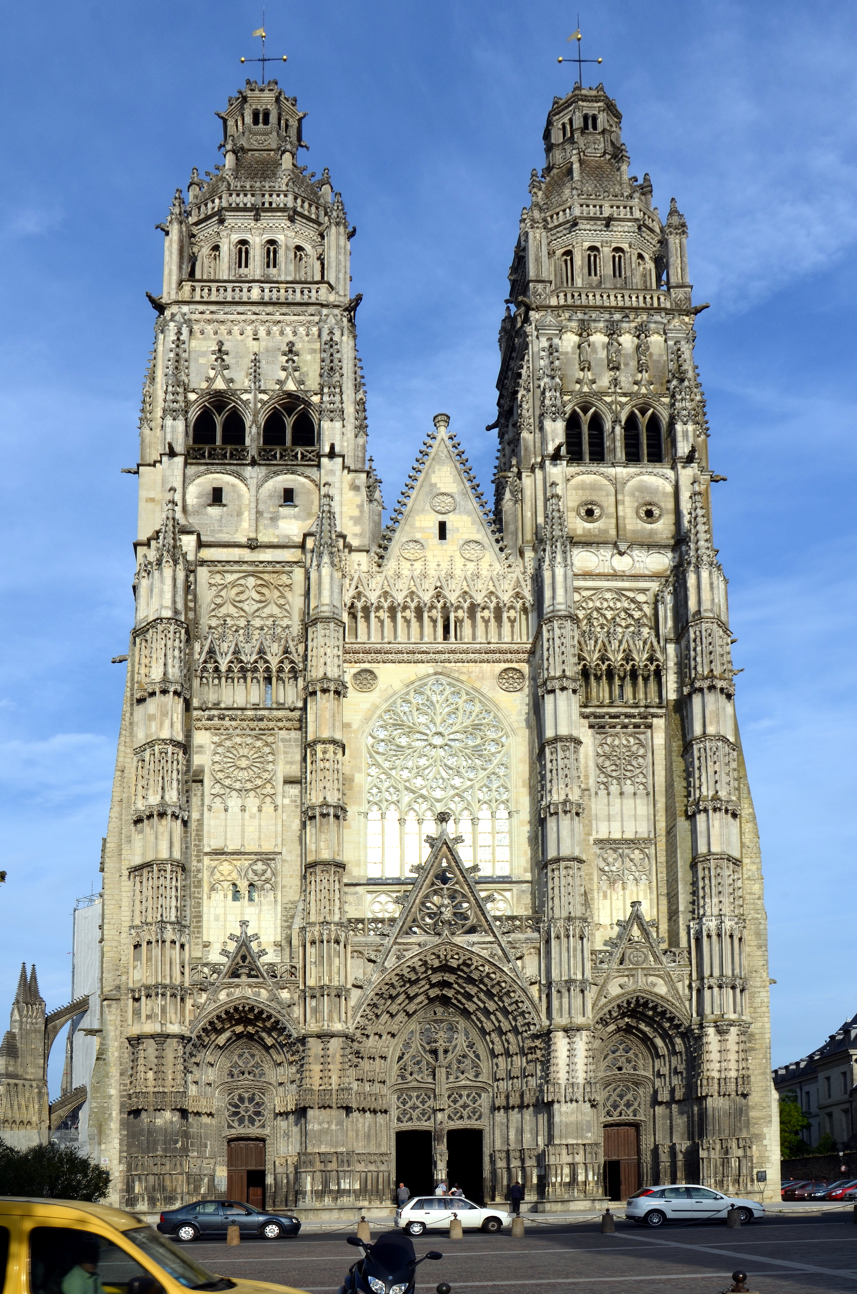 Cathédrale St-Gatien de Tours (Indre et Loire, France). .